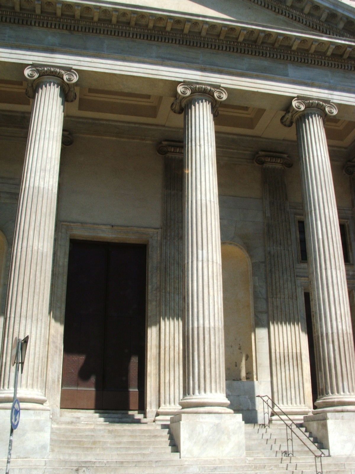 Dettaglio della facciata della basilica della Santissima Annunziata del Vastato a Genova.